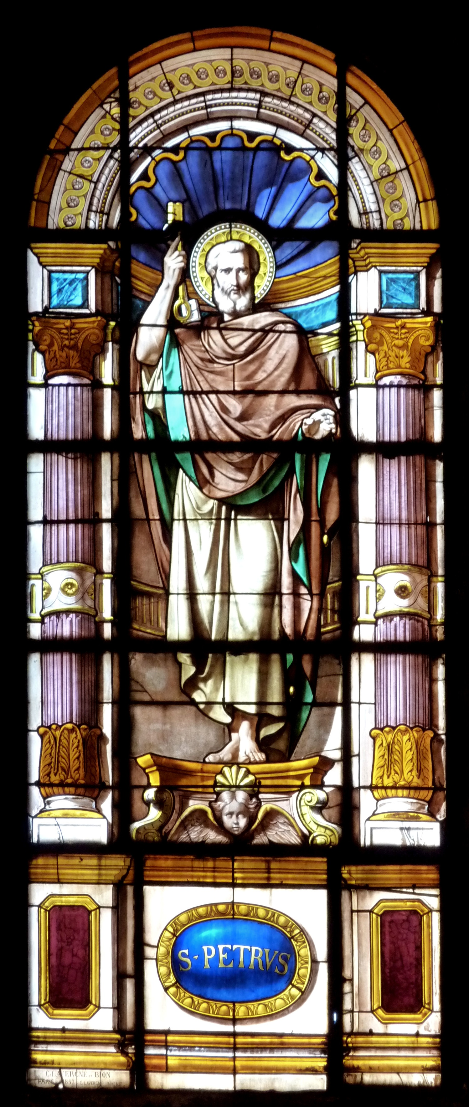 Kapelle des Krankenhauses Lariboisière in Paris, Glasfenster mit dem Apostel Petrus; links unten Inschrift: "C. Lavergne et Bion Paris 1857 C. Lavergne invenit"